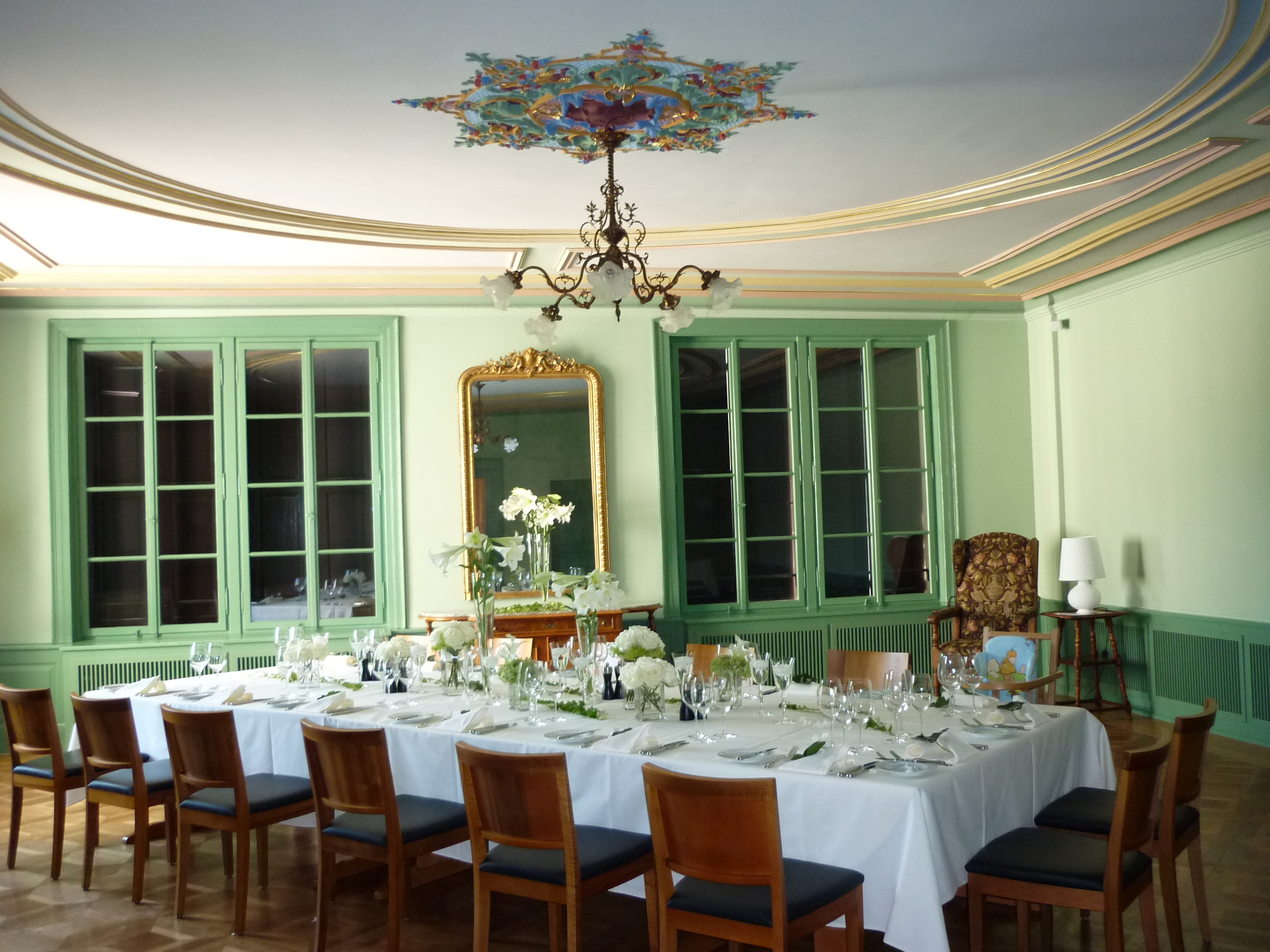 Gasthof Hirschen, Eglisau ZH, Schweiz